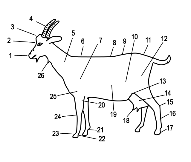 Anatomie de la chèvre: 1. Mufle 2. Chanfrein 3. Front 4. Cornes 5. Encolure 6. Garrot 7. Epaule 8. Dos 9. Reins 10. Flanc 11. Croupe 12. Cuisse 13. Grasset 14. Mamelle 15. Jarret 16. Canon 17. Pied 18. Trayons 19. Abdomen 20. Coude 21. Boulet 22. Paturon 23. Boulet 24. Genou 25. Bras 26. Pampilles (Infos pris de Michel de Simiane, La chèvre, Ed. Rustica, 2003, p. 15. ISBN 2-84038-538-4.)